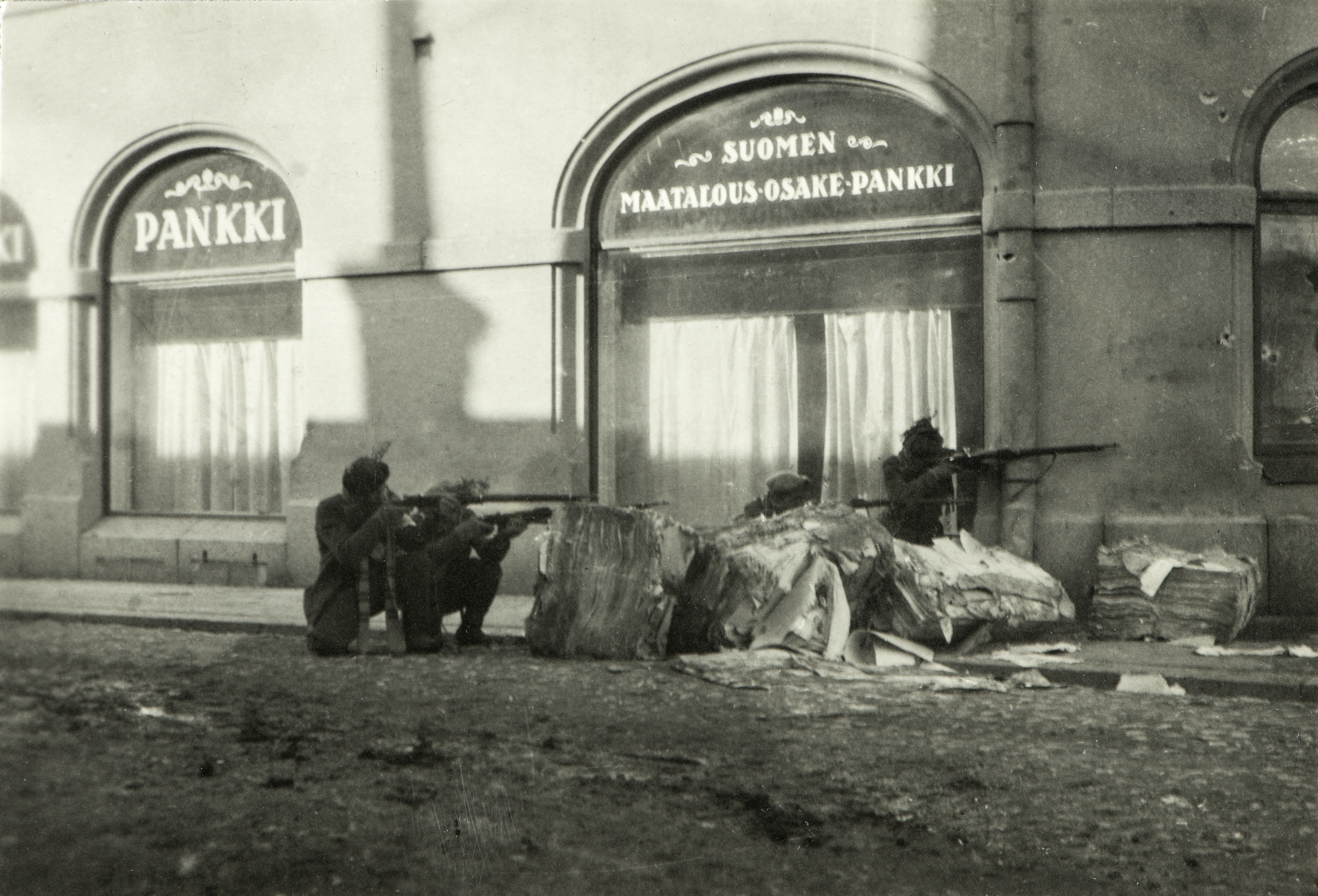 Punakaartilaisten ampumavarustuksia Tampereen Keskustorilla 1918